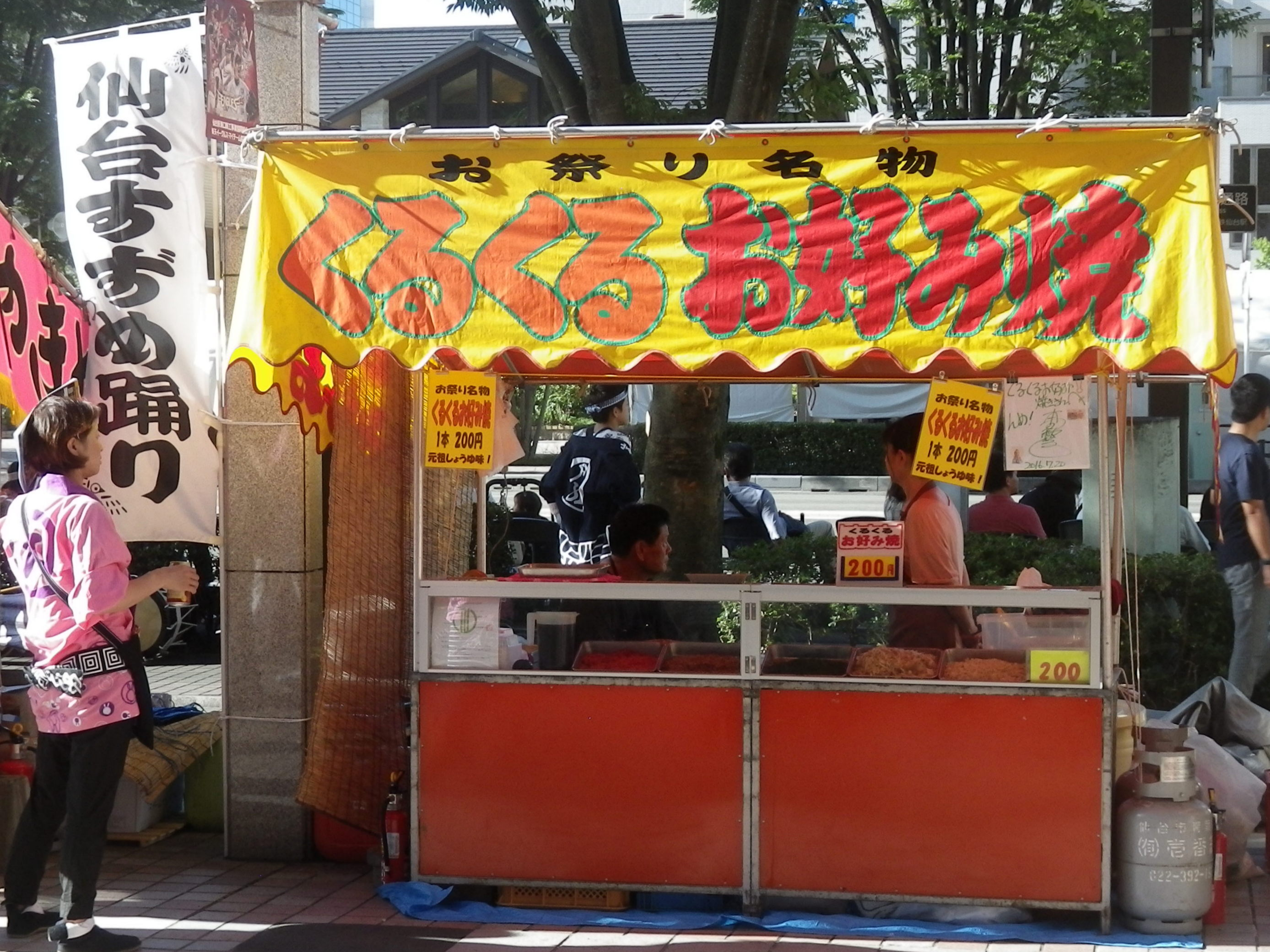 くるくるお好み焼き